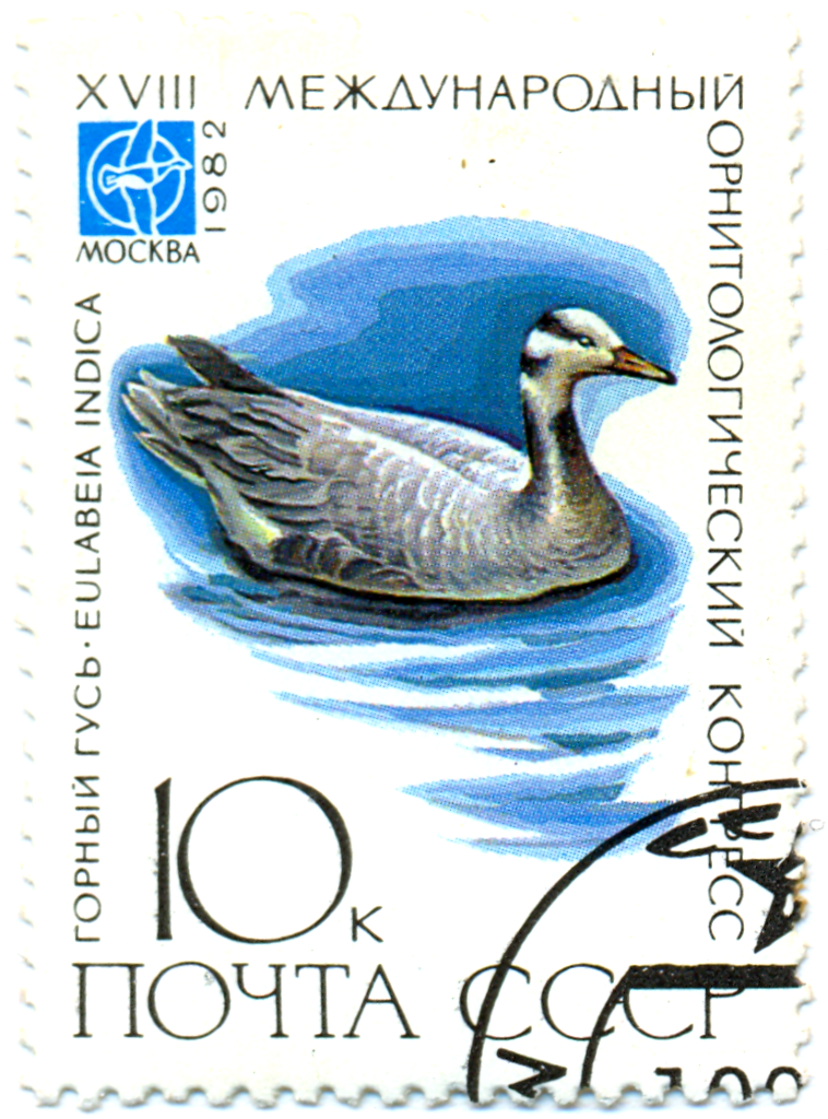 Почтовая марка с изображением горного гуся (Москва-1982 год)